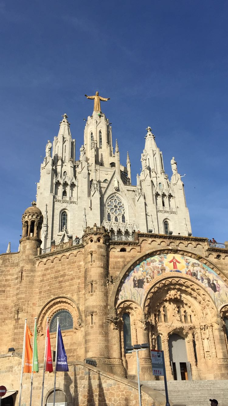 Foto scattata da me, in occasione di un mio viaggio recente a Barcellona